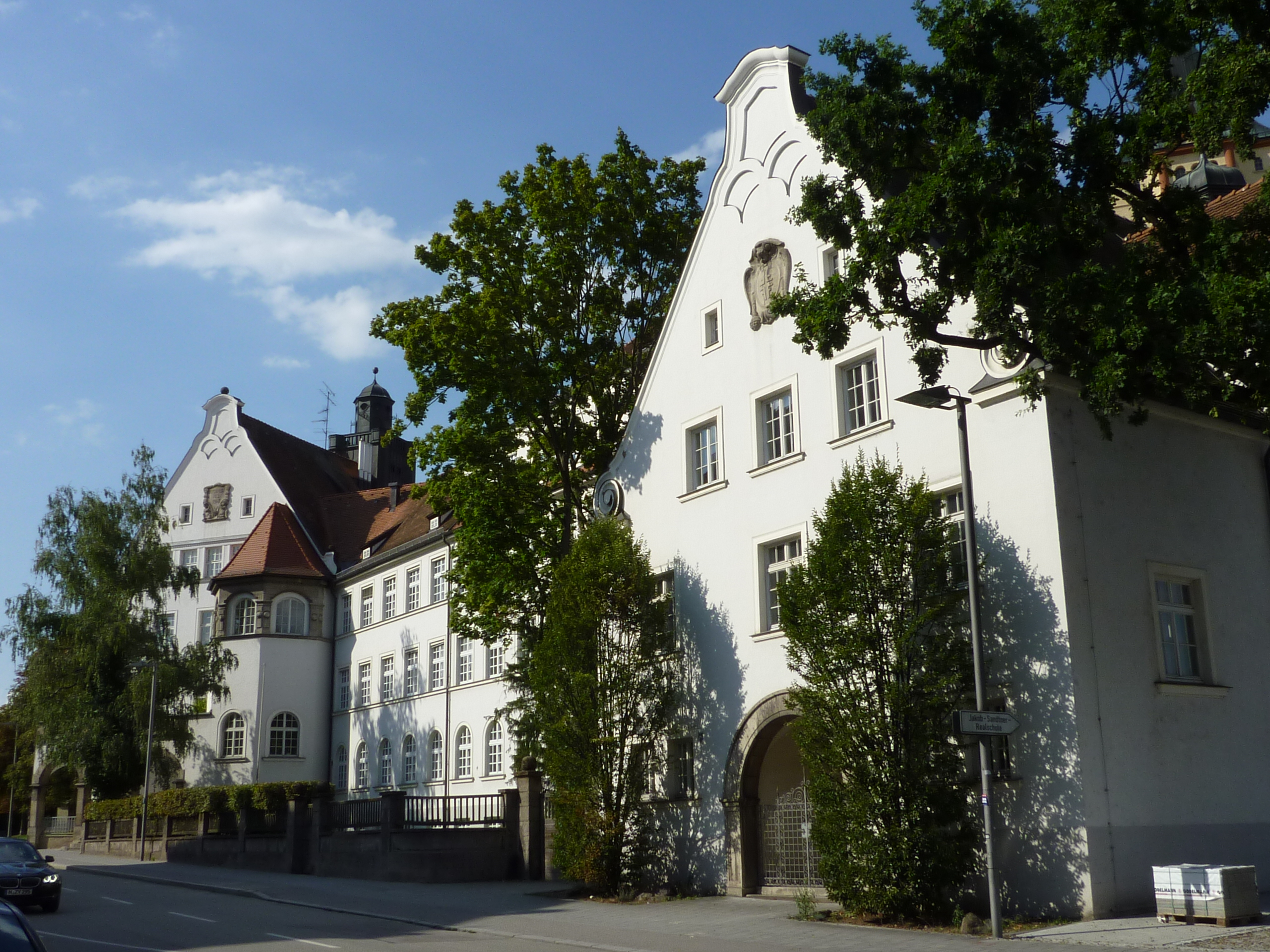 Die Jakob-Sandtner-Knabenrealschule an der Inneren Passauer Str. 1 in Straubing. Eine Anlage in drei Flügeln, Trakte mit Ziergiebeln und Zwerchhäusern in Renaissanceformen. 1913 von Robert Vorderhölzer erbaut. Der Bau setzt einen bedeutenden Akzent am östlichen Rand der Altstadt und gehört zur Liste der Baudenkmler in Straubing.This is a photograph of an architectural monument.